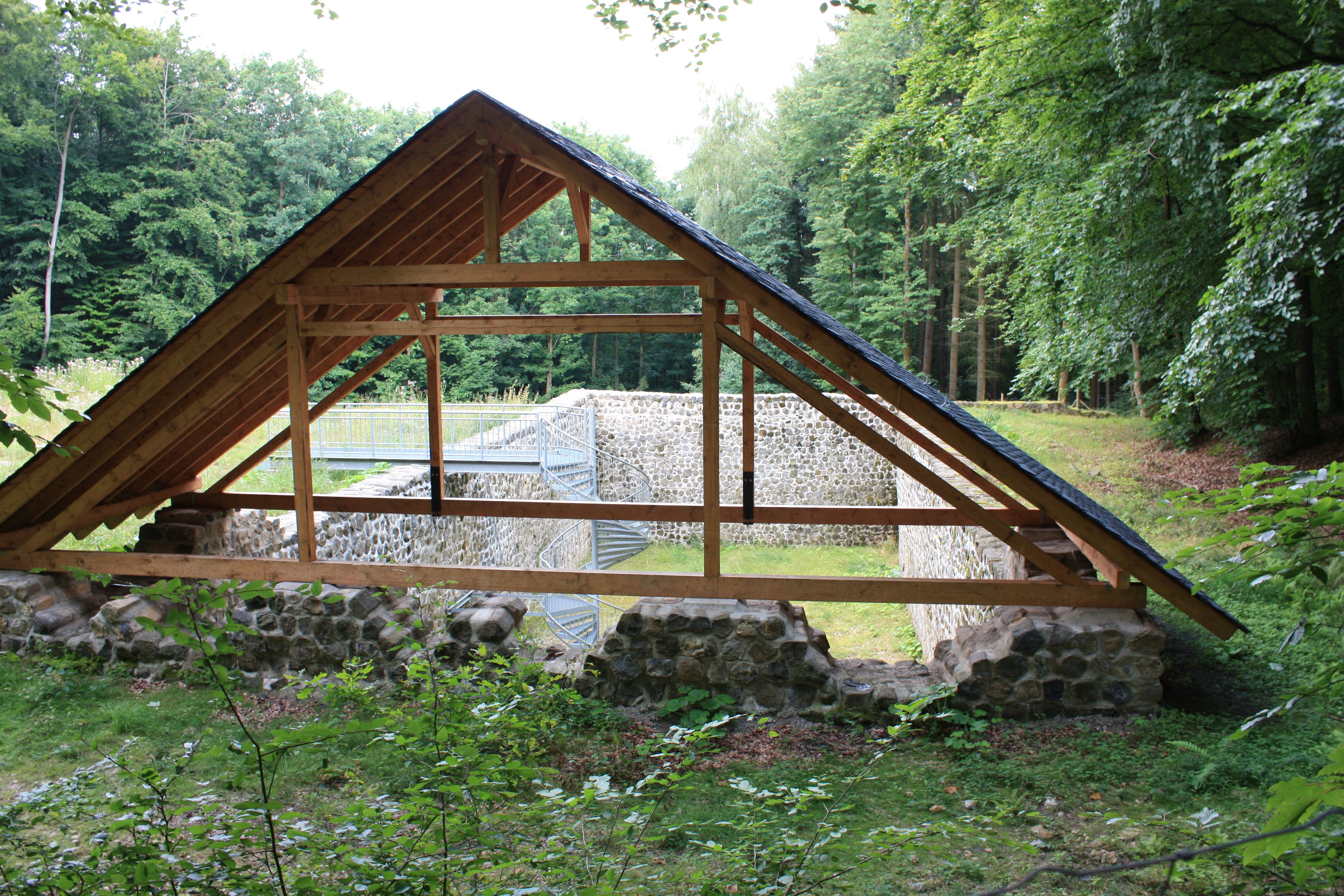 Wasserreservoir des Weilburger Schloss (erbaut 1710-1715, Wiederhergestellt 2008)